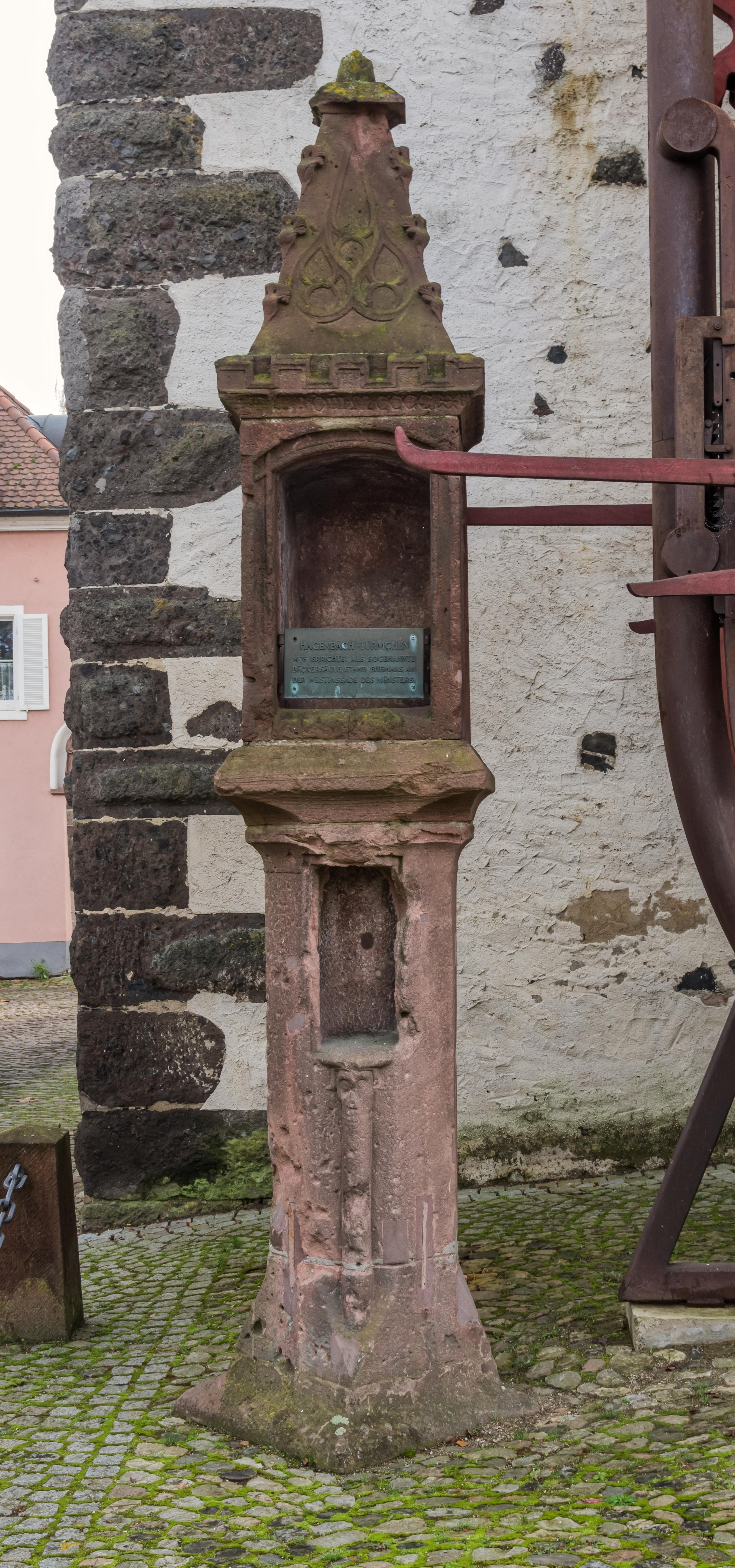 Bilder aus Breisach am Rhein Der Münsterberg Das Hagenbachtürmle aus dem Jahre "1476 errichtet als sogenannte Bäckersäule. Es stand ursprünglich an der der Westfassade des Münsters." Gleichzeitig die Inschrift auf der Tafel